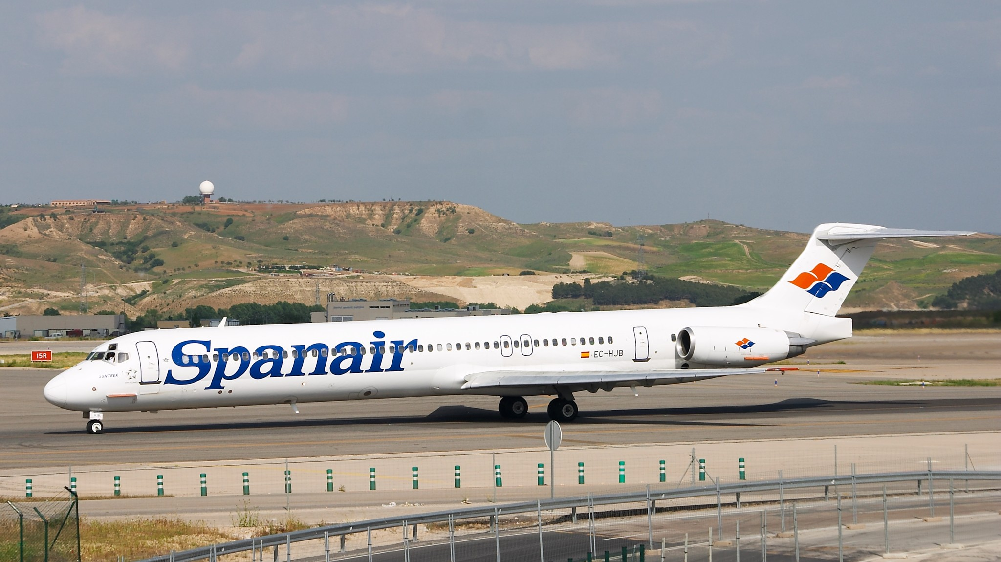 McDonnell Douglas MD-82 de Spanair rodando para despegar del aeropuerto de Madrid Barajas.